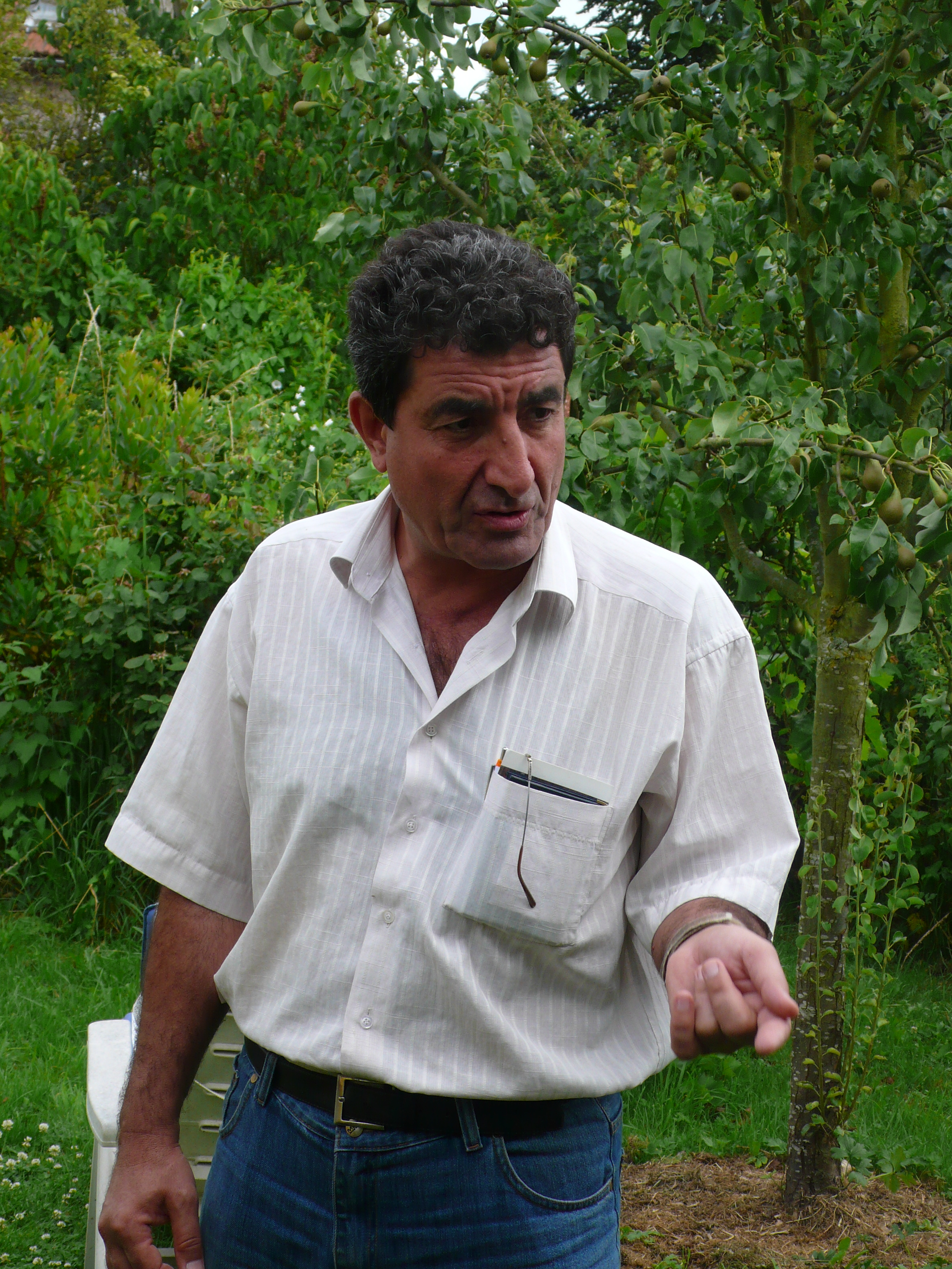 Falah Alwan, syndicaliste Irakien, lors d'un déplacement en Europe.